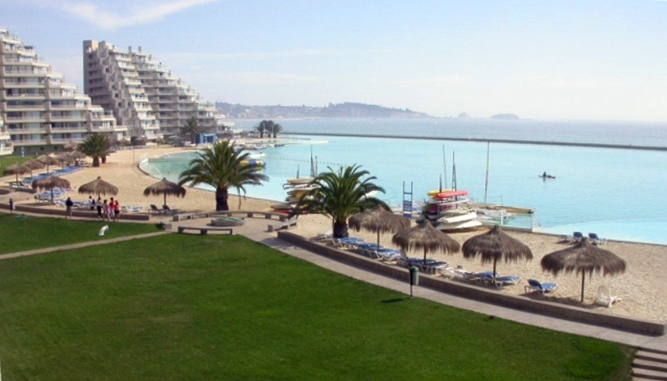 Interior del condominio San Alfonso del Mar, en Algarrobo, Chile.